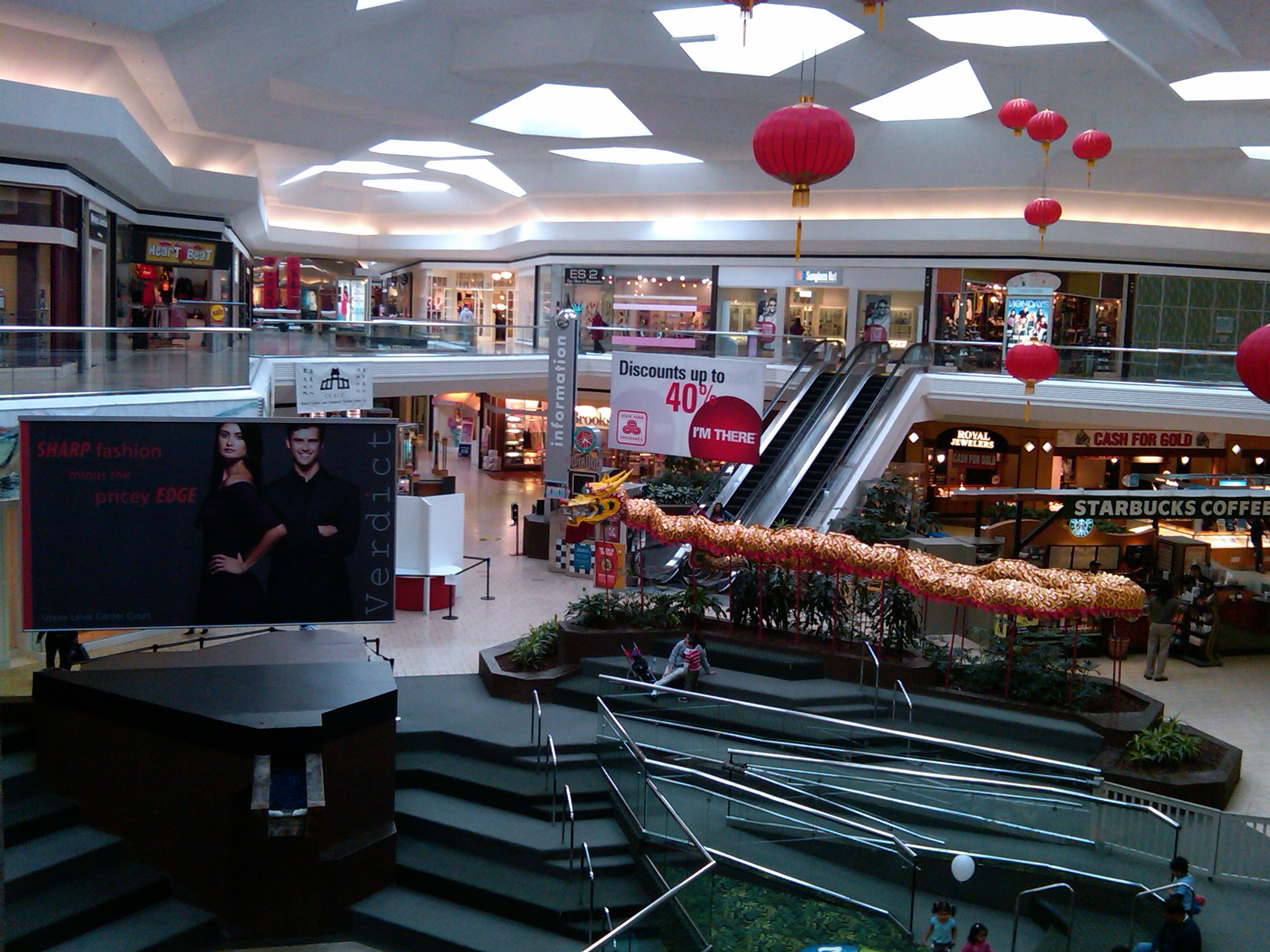 LakeFOREST MALL